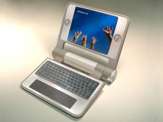 $100 Laptop prototype